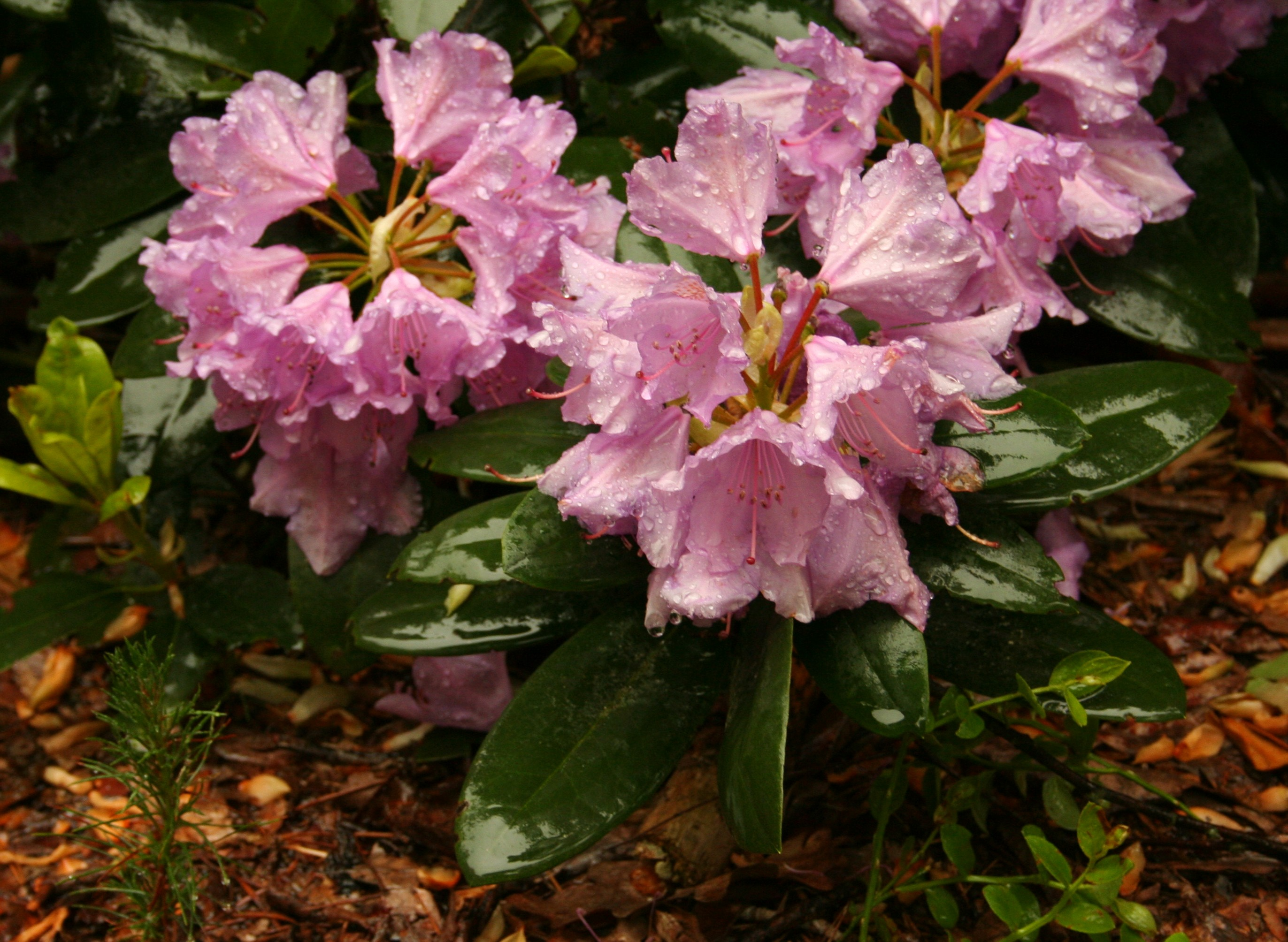 Rhododendron catawbiense